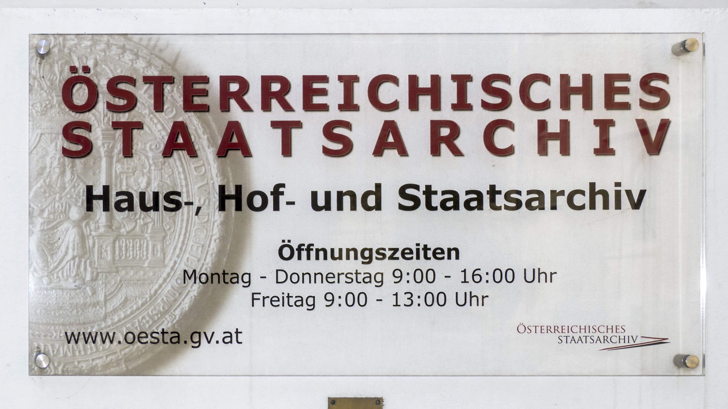 Tafel am Österreichischen Staatsarchiv in Wien 1, Minoritenplatz